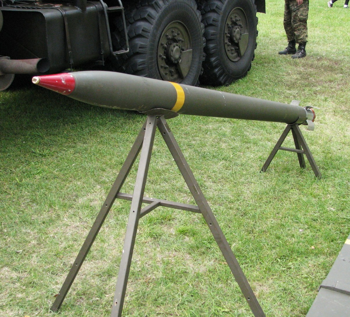 Raketa 122mm M-21 za SVLR Grad BM-21